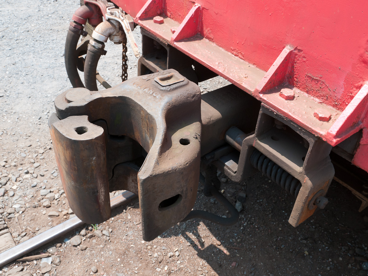 アライアンス式自動連結器、下作用型。